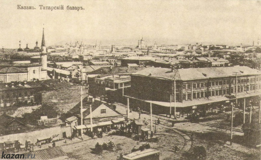 Казань конца ХIХ - начала ХХ века